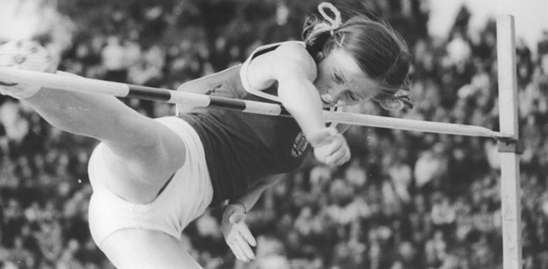 Rosemarie Ackermann ADN-ZB Spremberg 23.2.75 Senftenberg: Mit nur einem Zentimeter verfehlte die Springerin Rosemarie Ackermann (SC Cottbus) am 23.2. auf der Leichtathletik-Hallenmeisterschaft der DDR ihre eigene Weltbestleistung von 1,94 m. Unser Foto stammt von einem früheren Wettkampf.